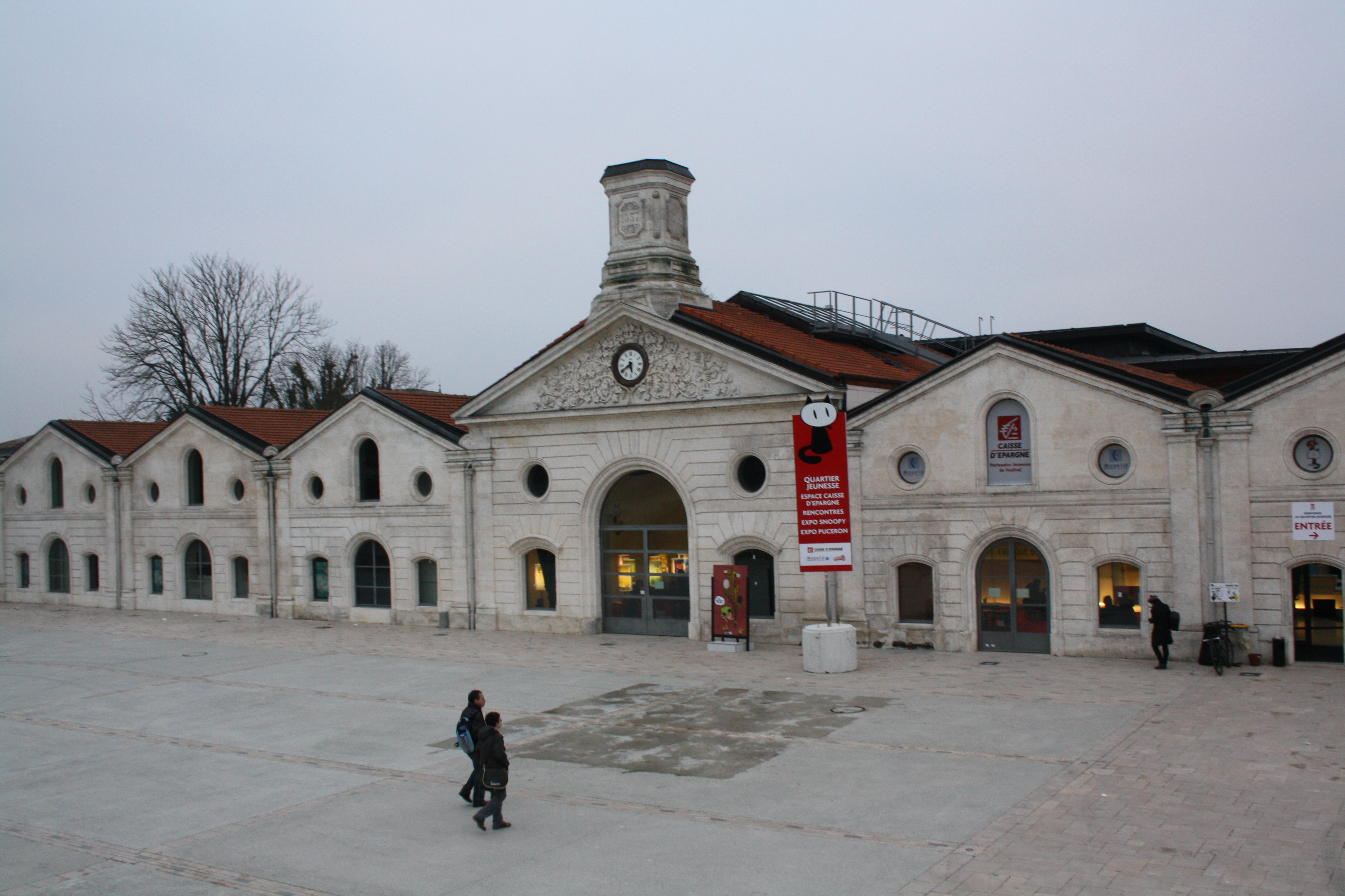 Musée de la BD durant le festival d'Angoulême.